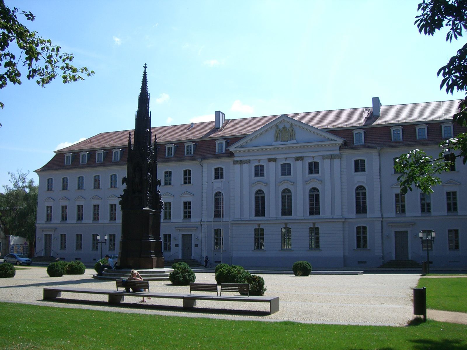 Greifswald